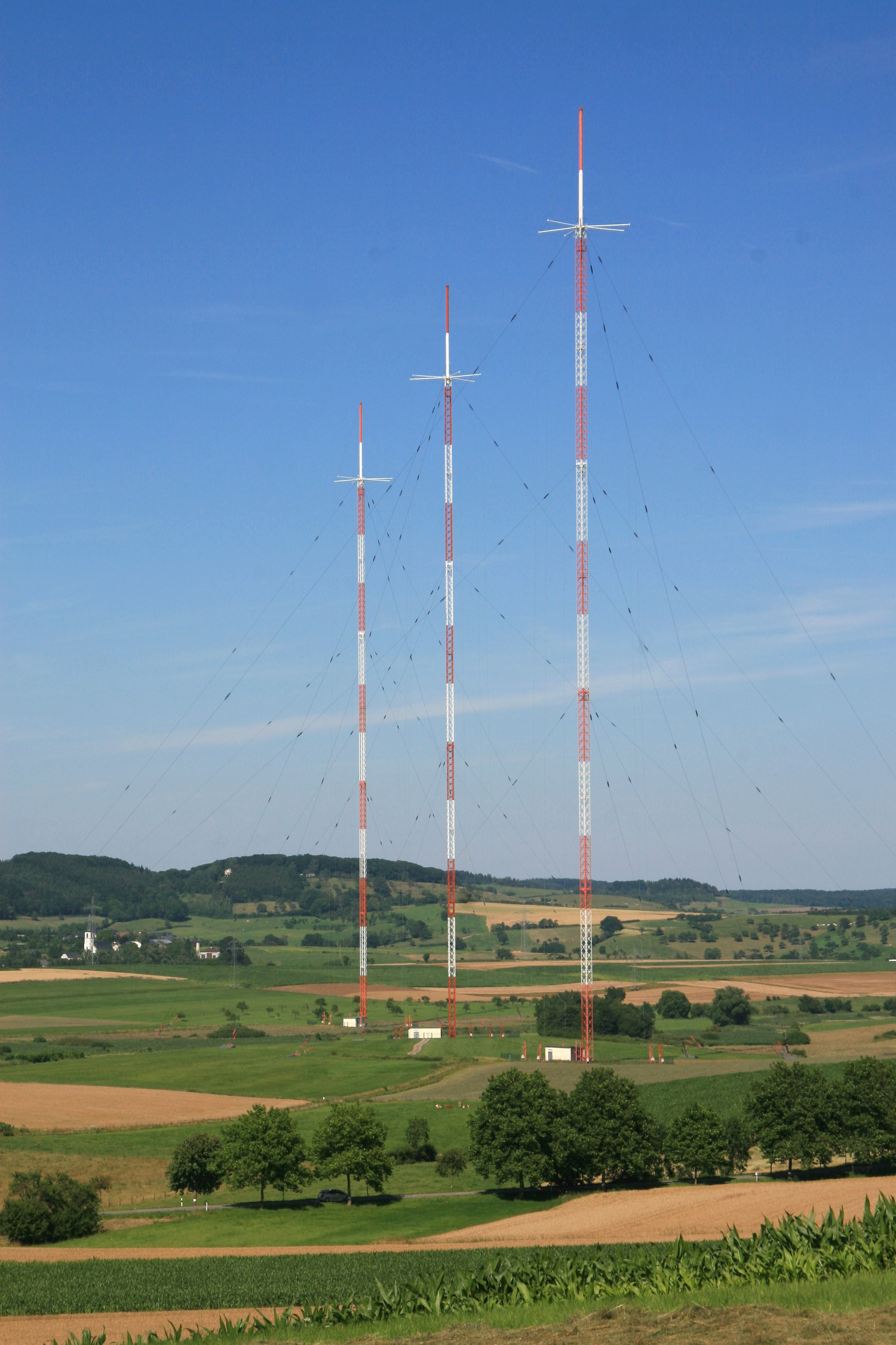 Vue op d'Antenne vu Beidweiler, Beidler - user Ioni